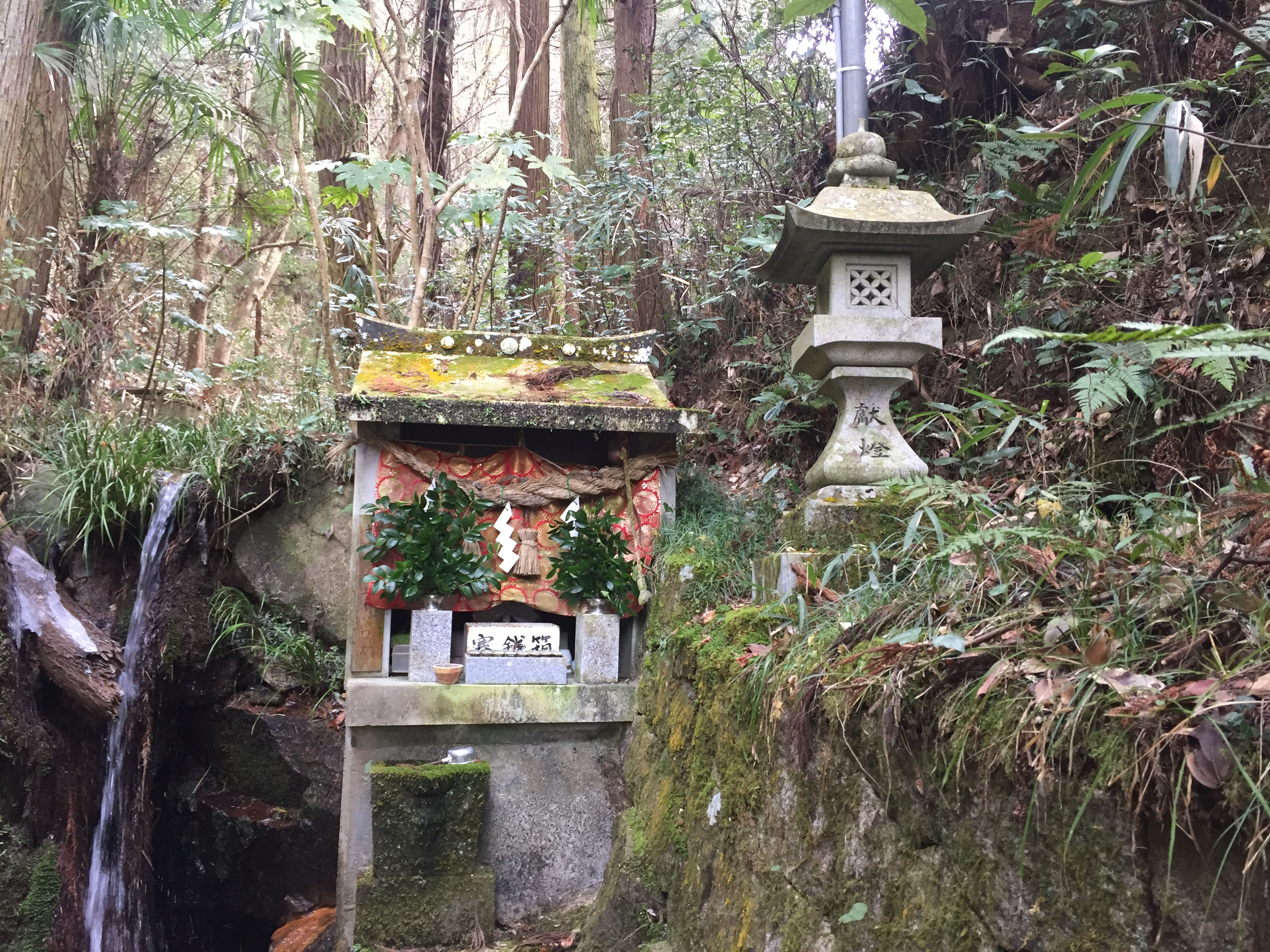 大滝神社末社